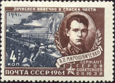 Герой Советского Союза сержант В. П. Мирошниченко (1916-1941). Художник: Л. Голованов. Марка СССР, номинал - 4к.